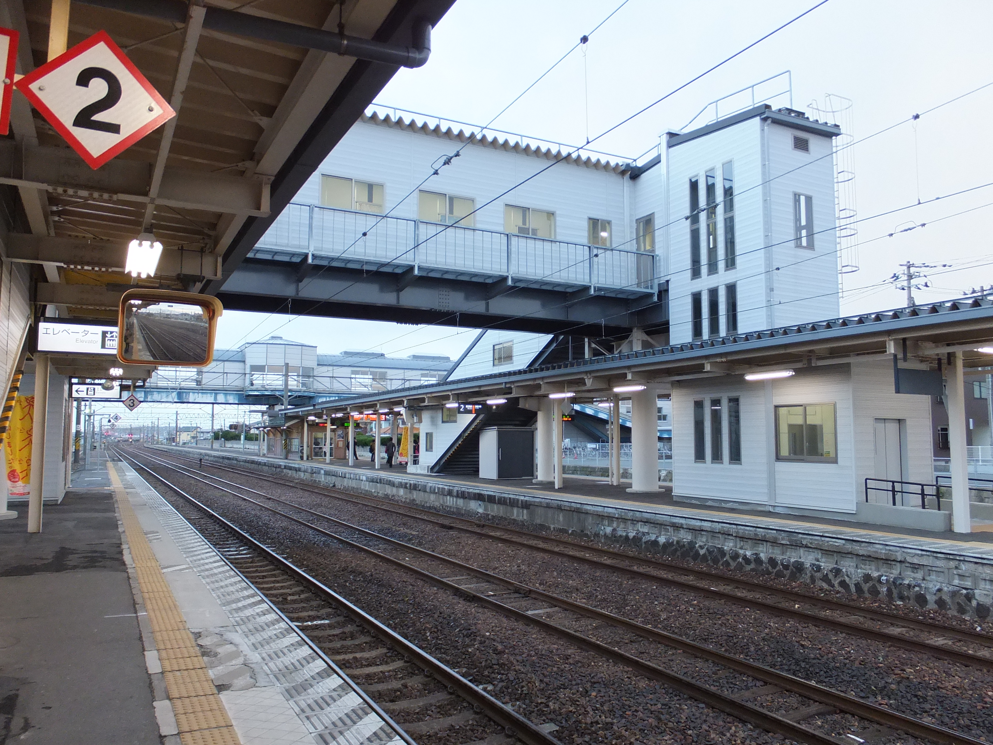 土崎駅プラットホーム。跨線橋は2011年に新たに架け替えられ、駅本屋に近づけられた。